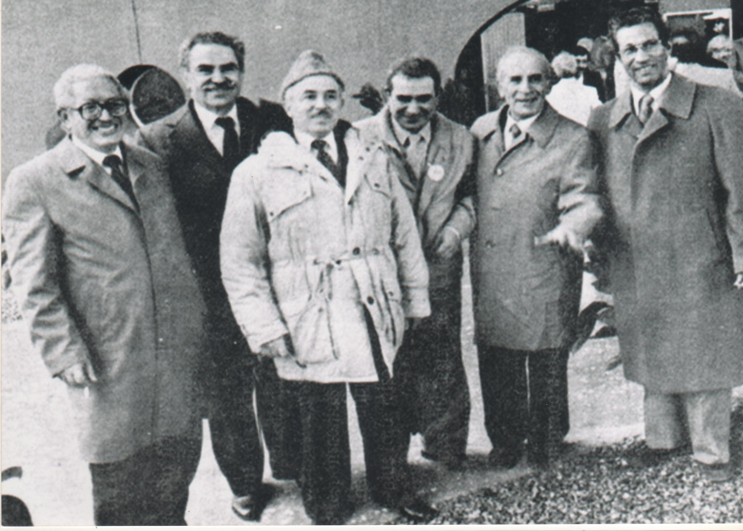 Médecins de l'ALN, le Professeur Boudraa se trouve à droite